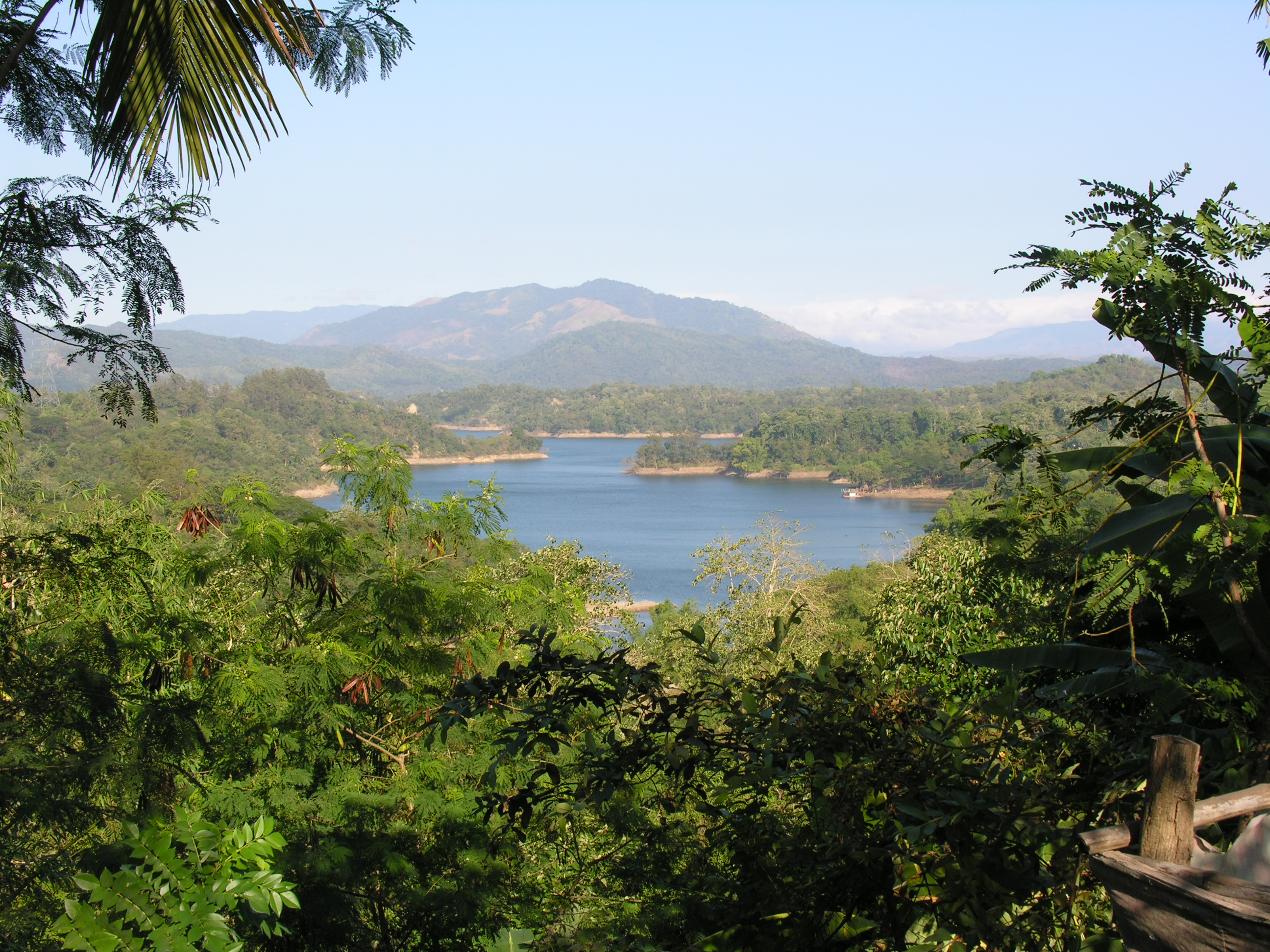 Der Pantabangan-Stausee ist eine große Talsperre am Fluss Pampanga in den Philippinen.